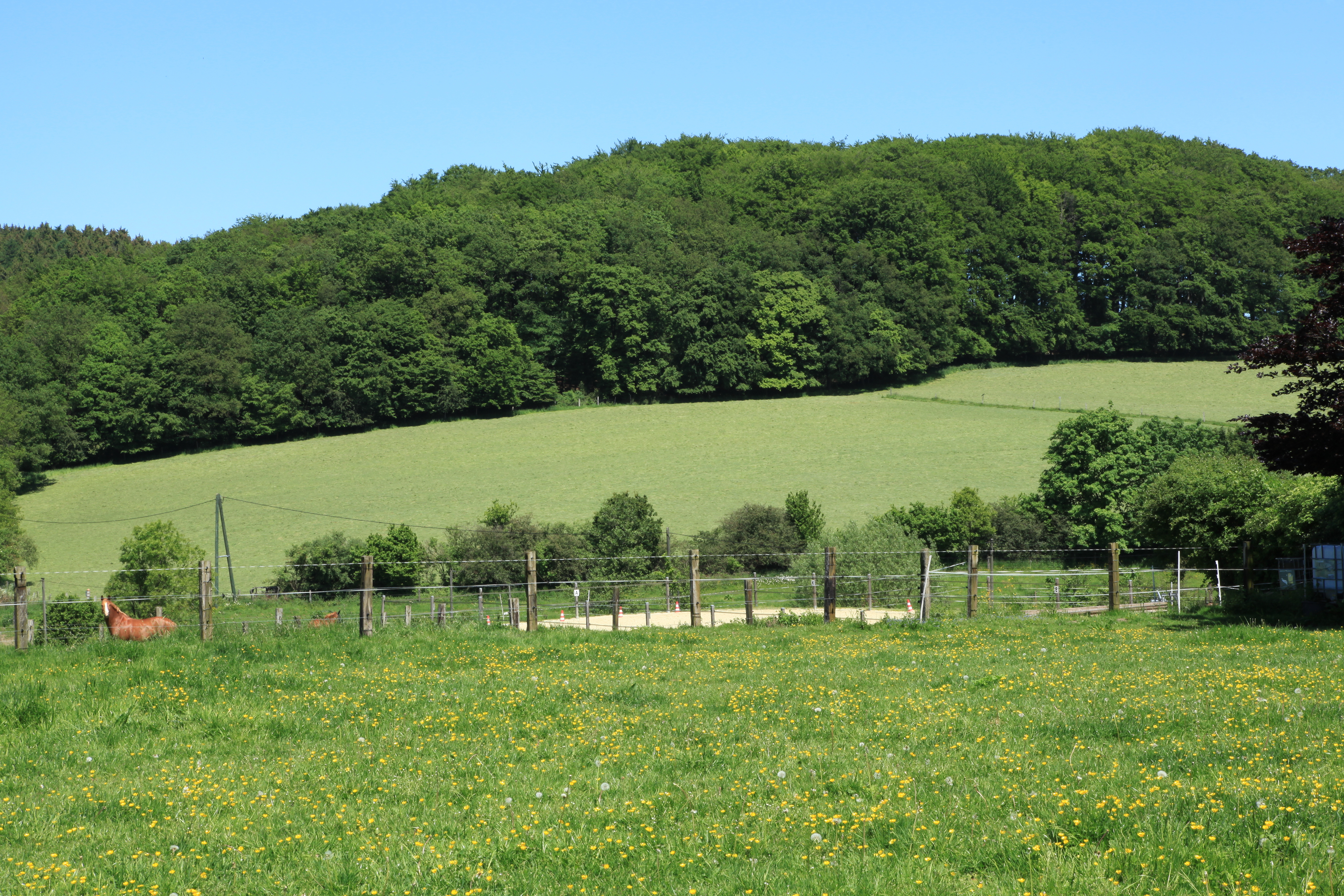 Am Linnerhof in Asbeck, Gevelsberg